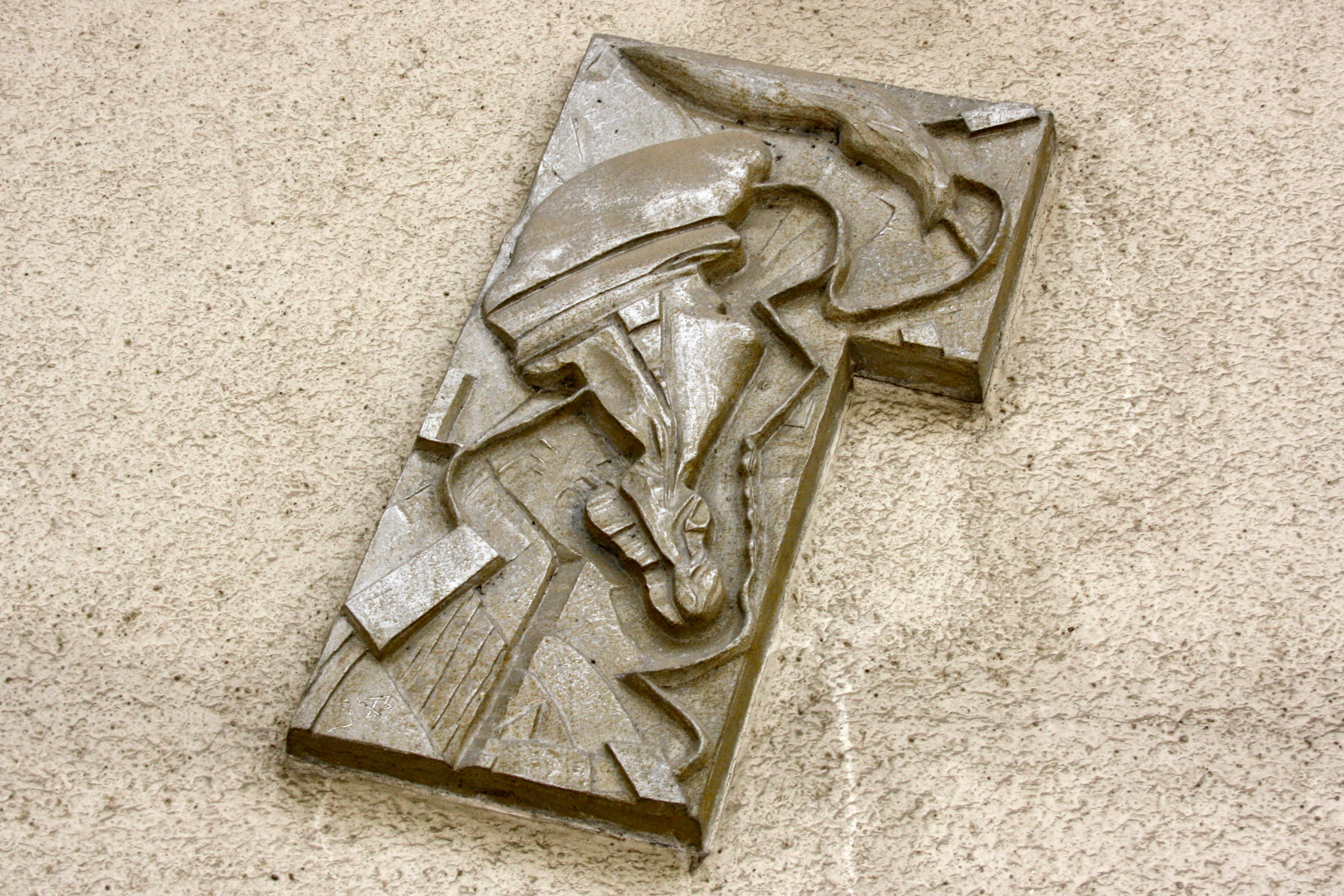 Relief von Johann Jascha am Max-Böhm-Hof in Wien-Josefstadt. This media shows the Vienna residential building (Gemeindebau) with the ID 294 (Max-Böhm-Hof).